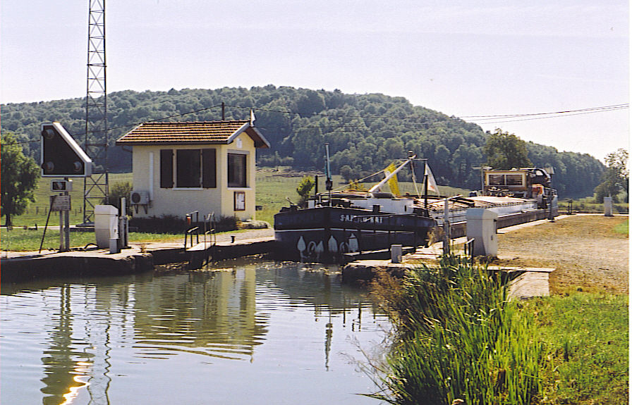 propre photo